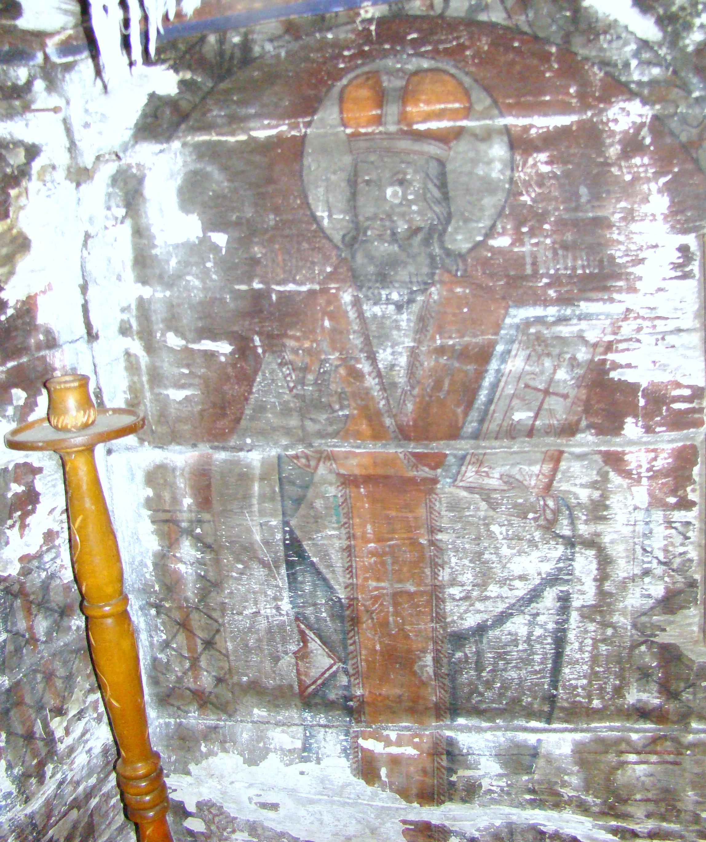 Biserica de lemn „Înălţarea Sfintei Cruci" din Pruneni